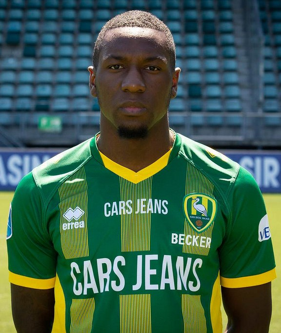 Sheraldo Becker